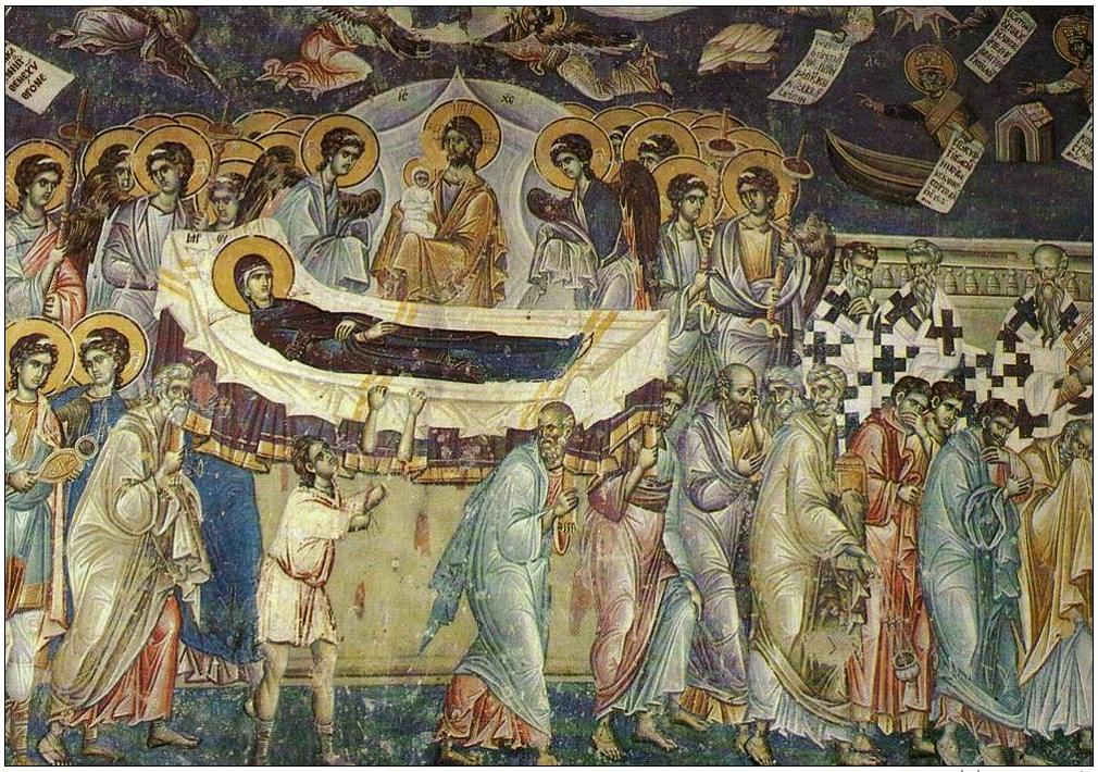 Успение в църквата „Св. Георги“ в Старо Нагоричане, Кумановско